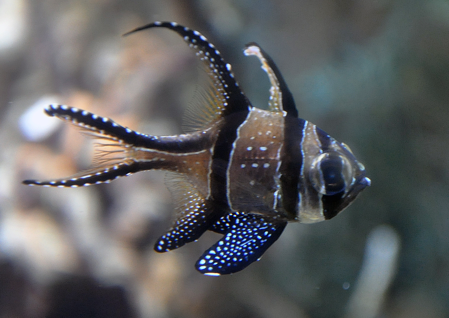 Pterapogon kauderni, Aquazoo Düsseldorf, Heimat: Sulawesi, beliebter Zierfisch